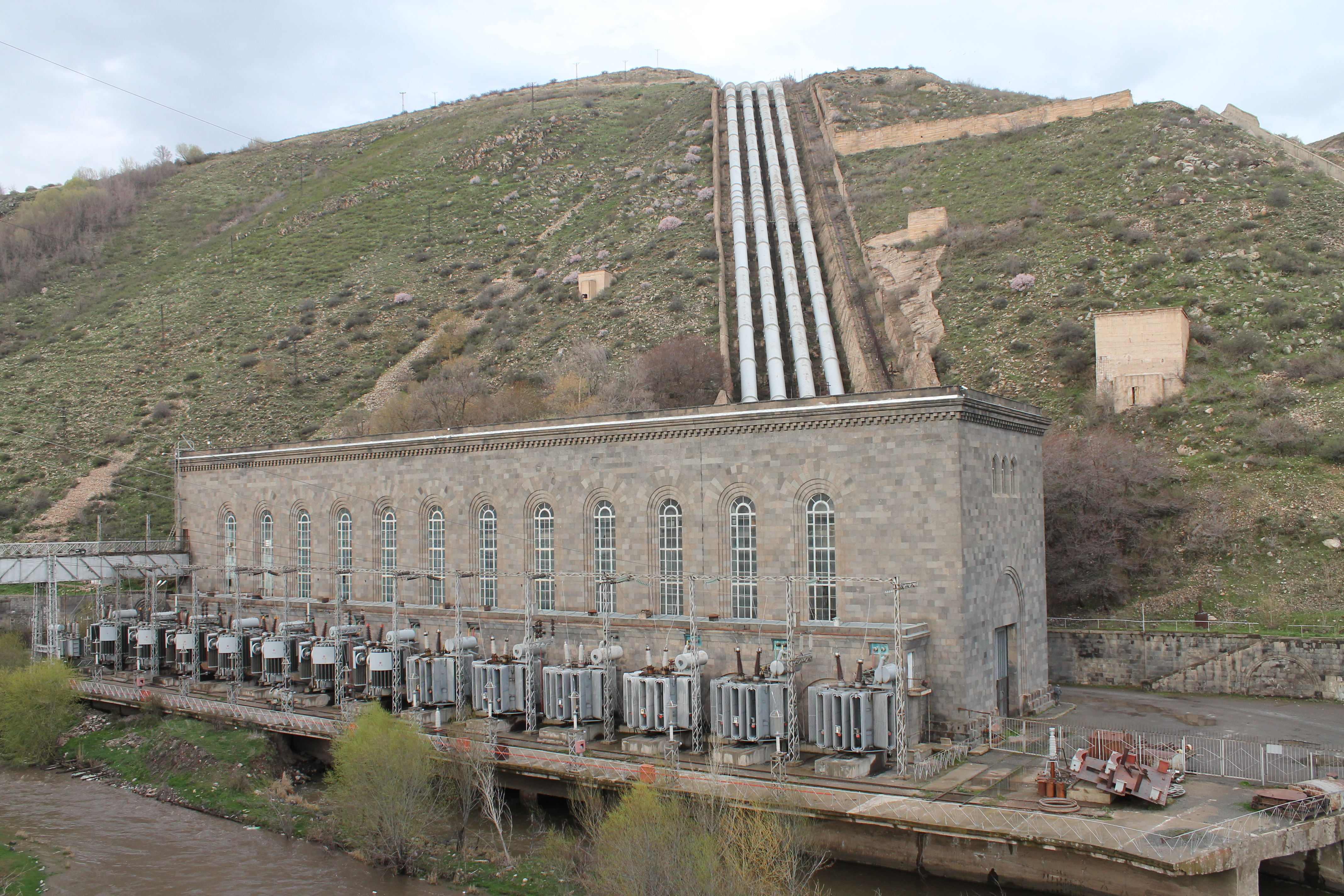 Здание Аргельской ГЭС